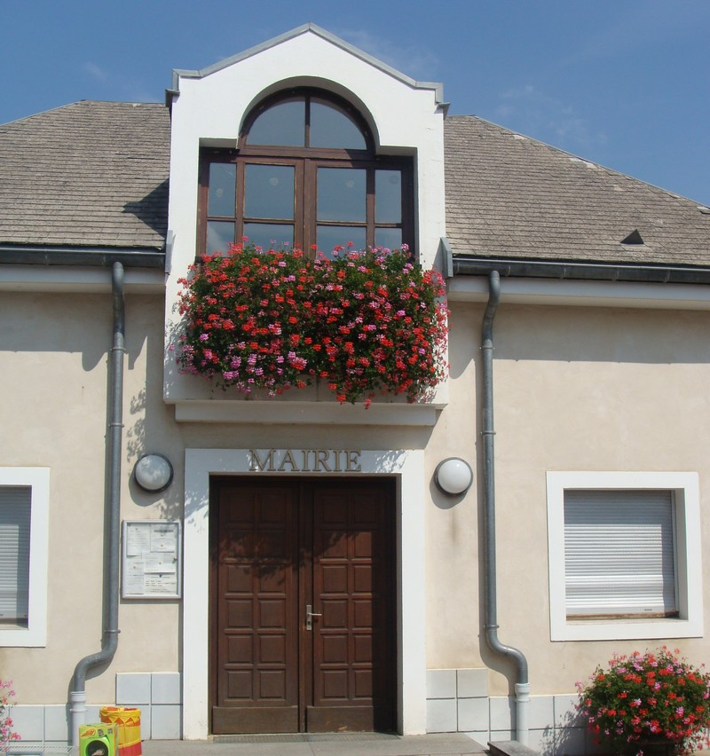 La mairie de Neffes (Hautes-Alpes).